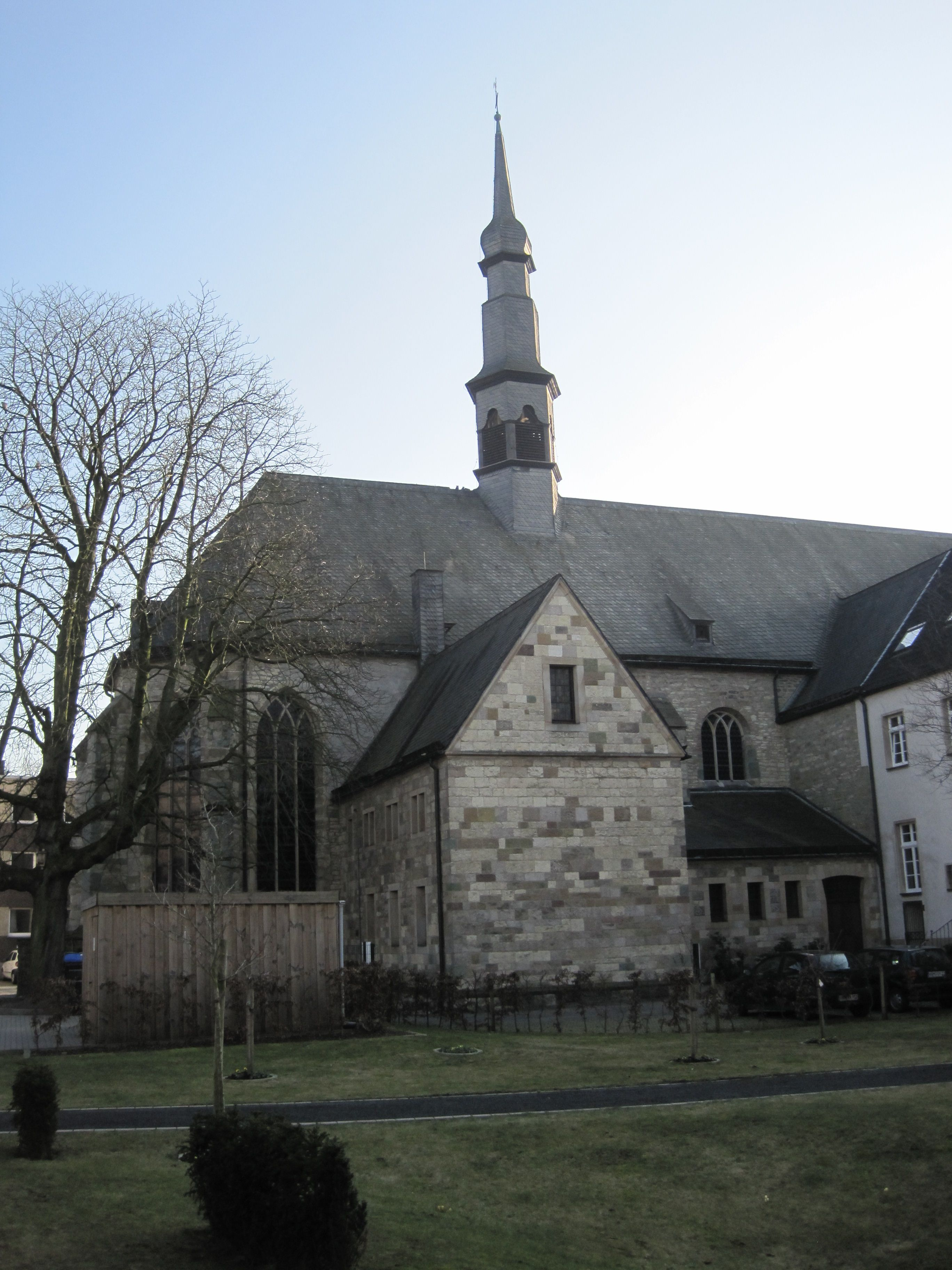 Das Foto zeigt die Rückseite der Agneskirche in Hamm.